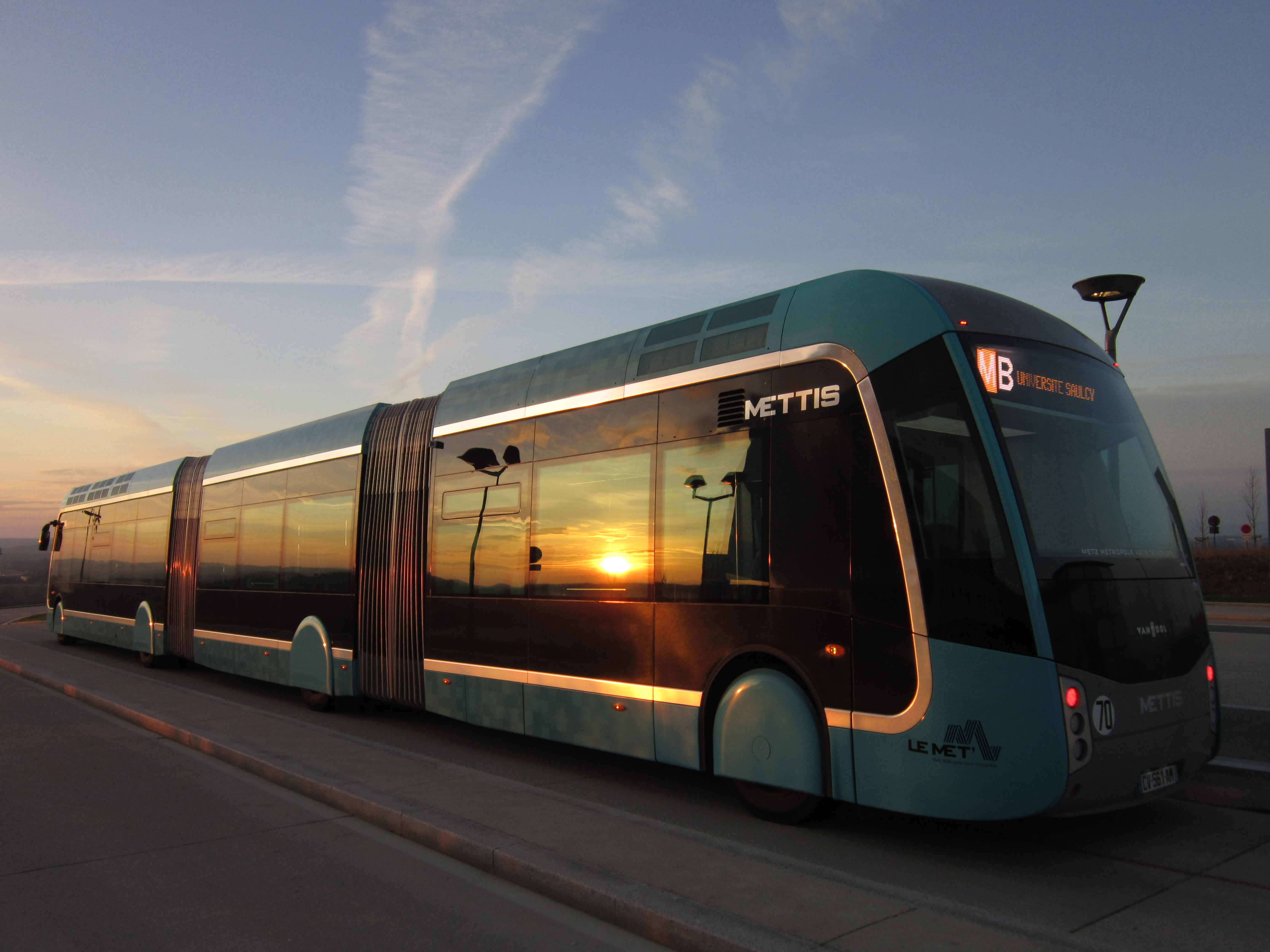 Van Hool Exquicity 24 design "Mettis" sur le réseau de Metz Métropole.